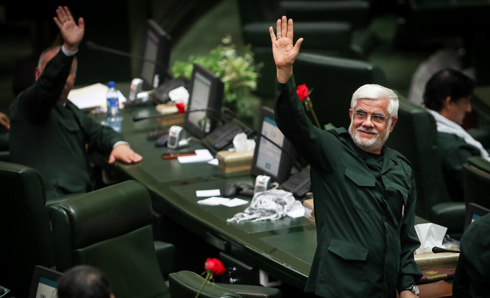 حضور نمایندگان مجلس شورای اسلامی ایران با یونیفرم سپاه پاسداران انقلاب اسلامی در جلسهٔ علنی ۲۰ فروردین ۱۳۹۸، به مناسبت روز پاسدار و در محکومیت اقدام دولت ایالات متحدهٔ آمریکا به قرار دادن سپاه پاسداران در فهرست گروه‌های تروریستی